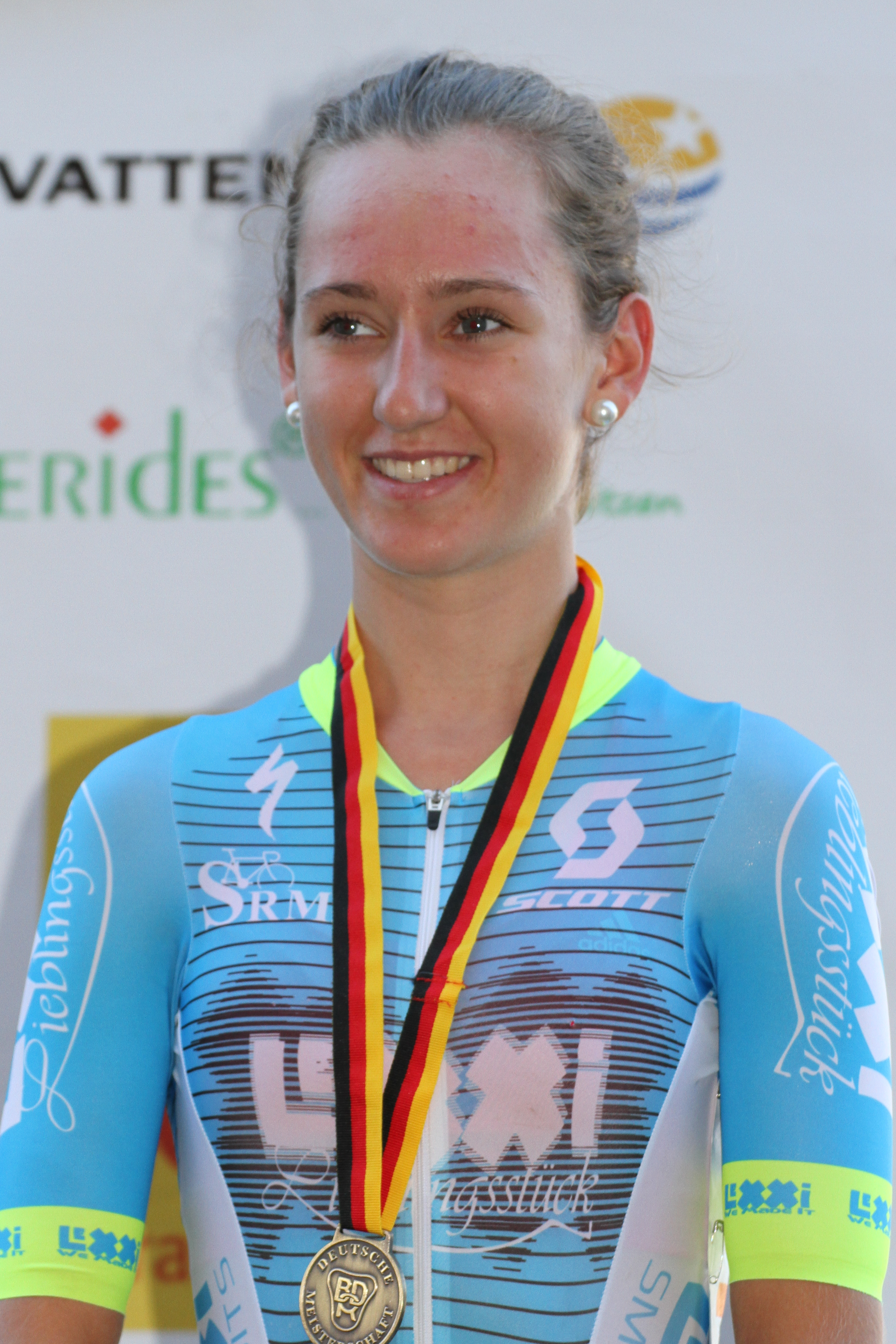 Lea Lin Teutenberg, deutsche Radsportlerin